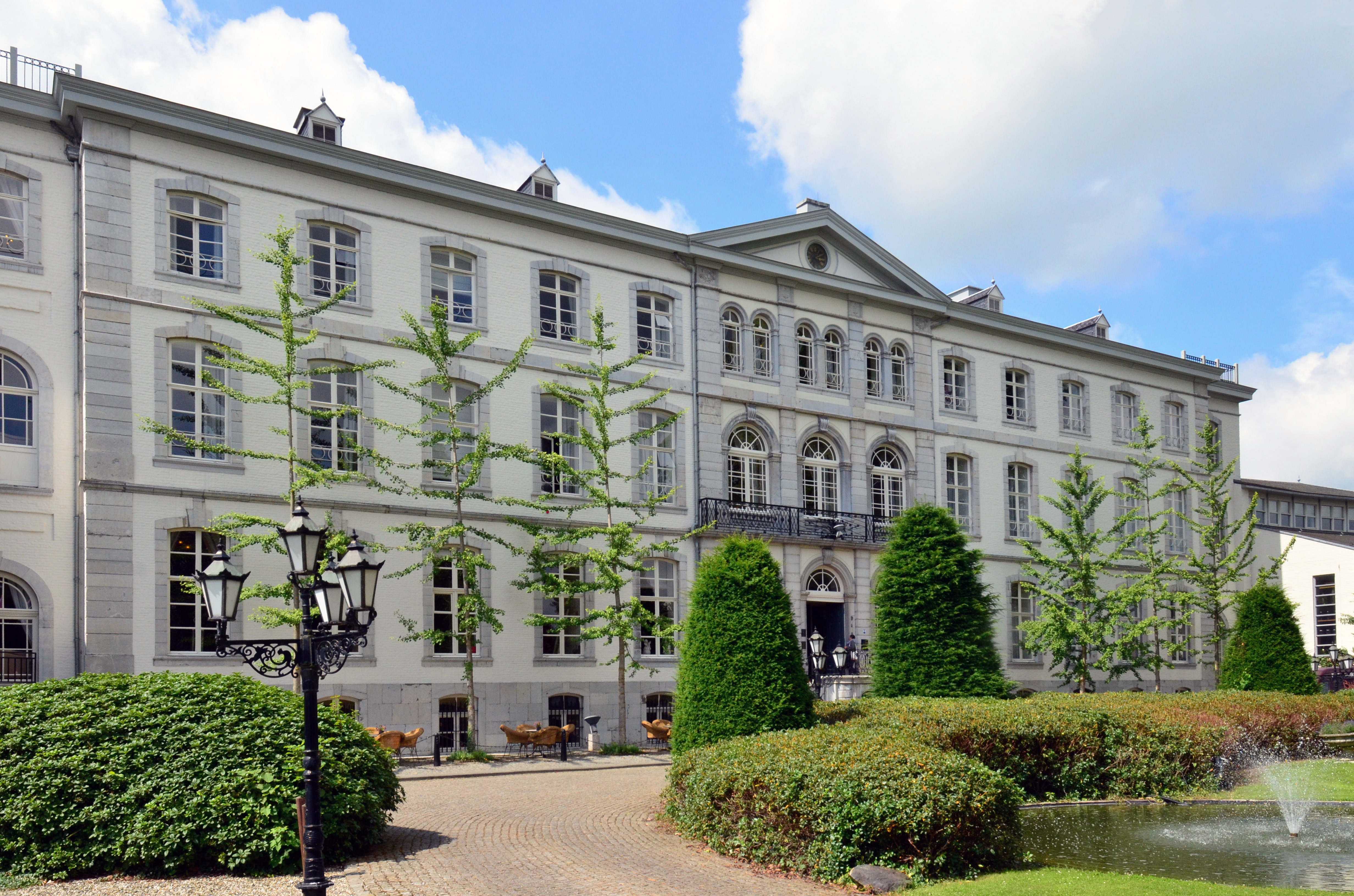 Eingangsfassade des Schlosses Bloemendal in Vaals